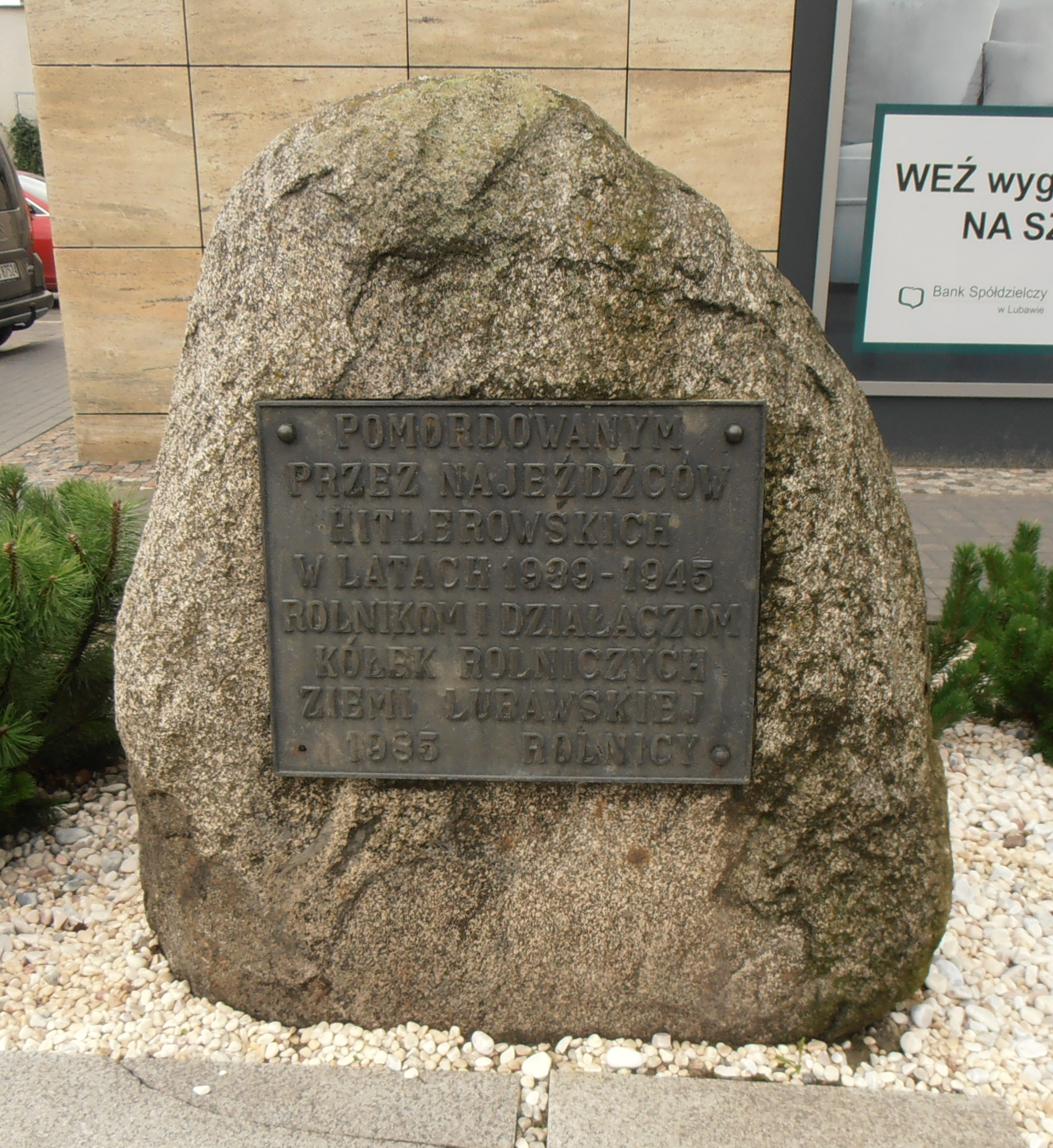 Lubawa. Kamień pamiątkowy. Treść inskrypcji: Pomordowanym przez najeźdźców hitlerowskich w latach 1939‒1945 rolnikom i działaczom Kółek Rolniczych Ziemii Lubawskiej. 1985. Rolnicy.